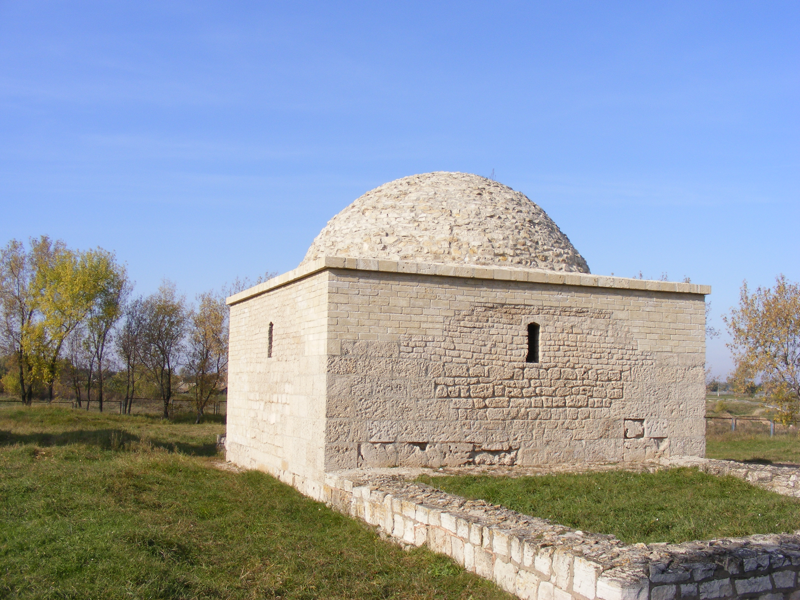 khans' burial vault in Bolgar, Tatarstan, Russia